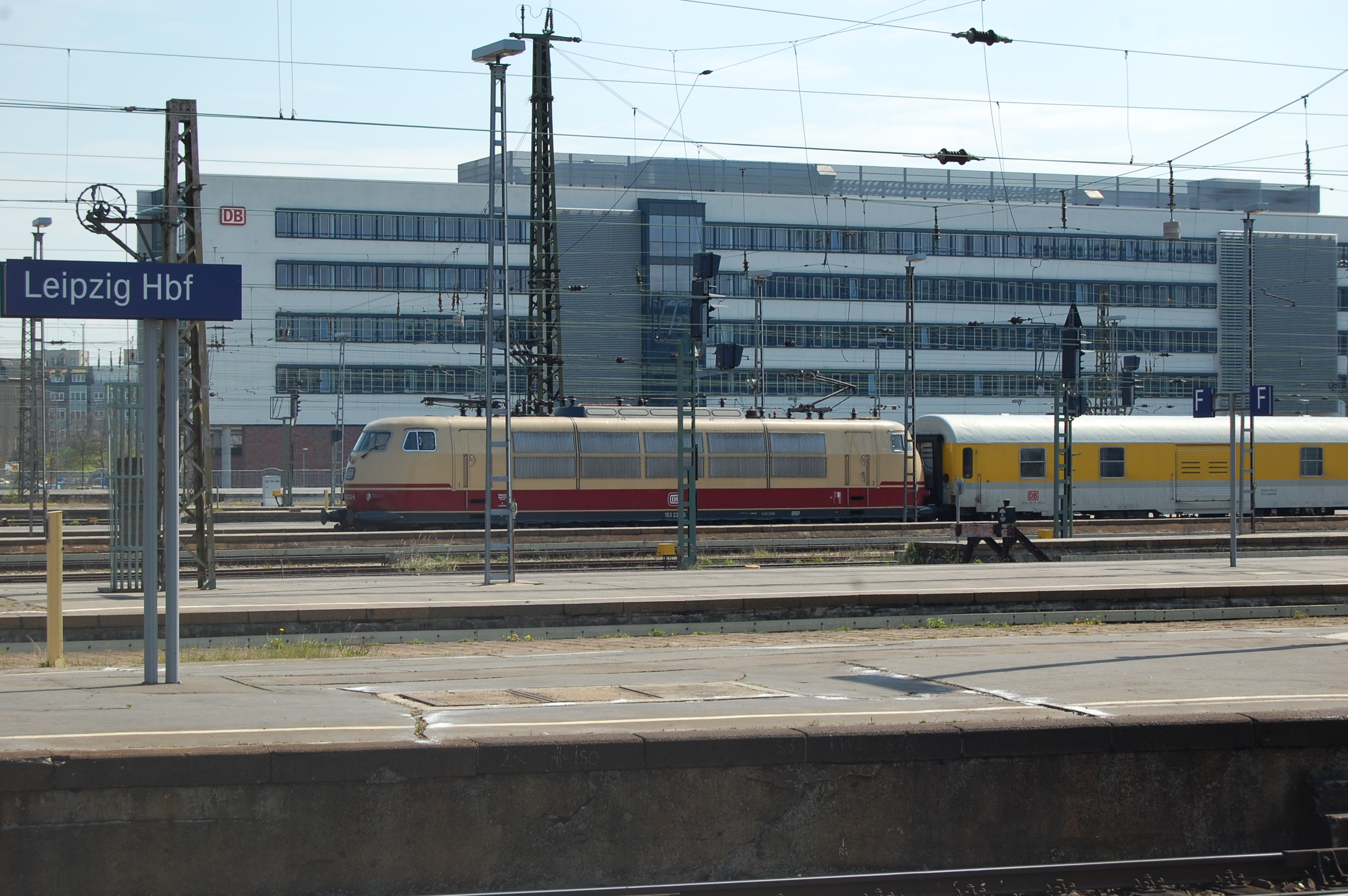 103 222 vor einem Messzug im Leipziger Hbf, im Hintergrund das Bürohaus der DB Netz AG Regionalbereich Südost.